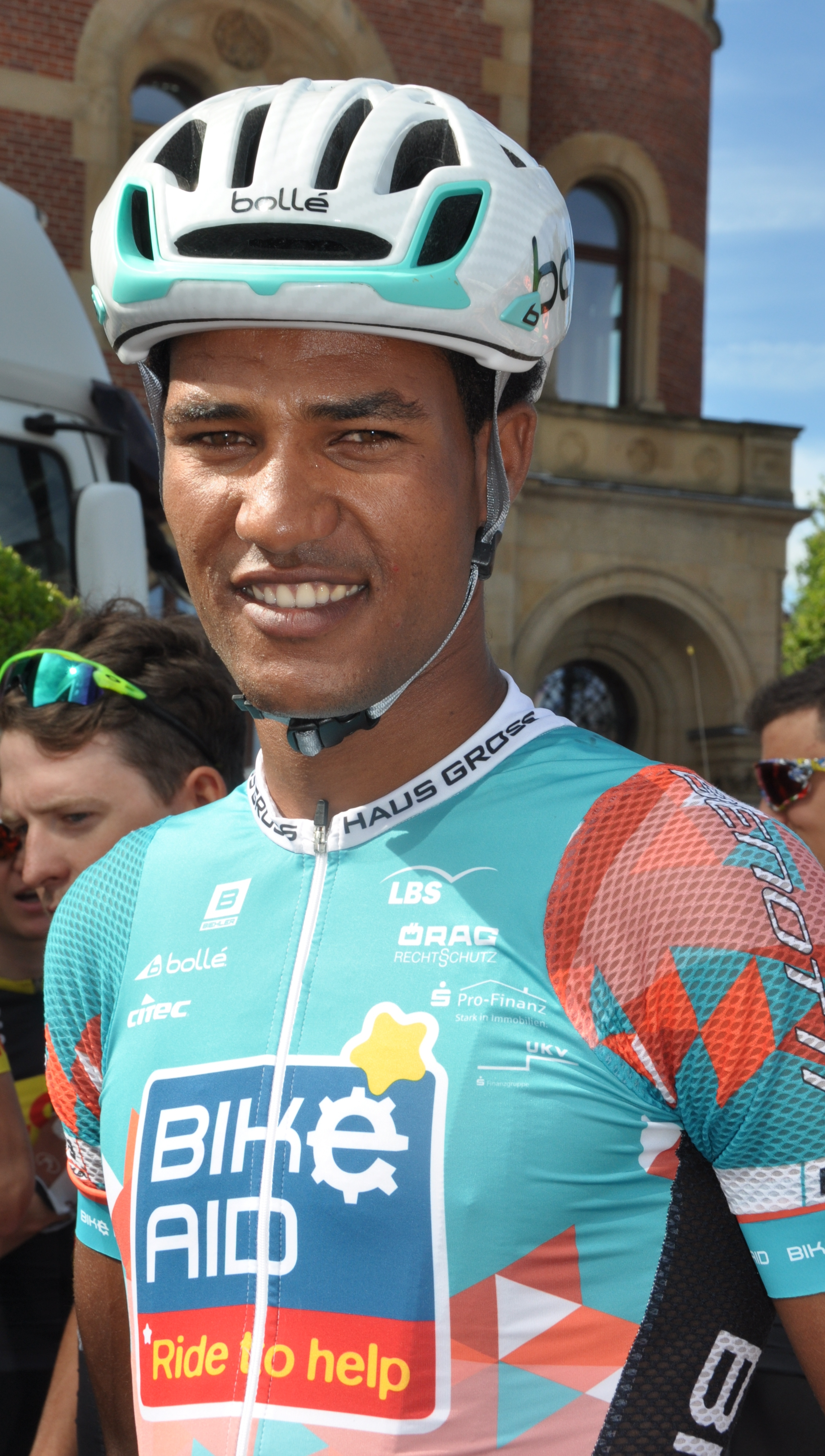 Awet Habtom, Rennfahrer aus Eritrea